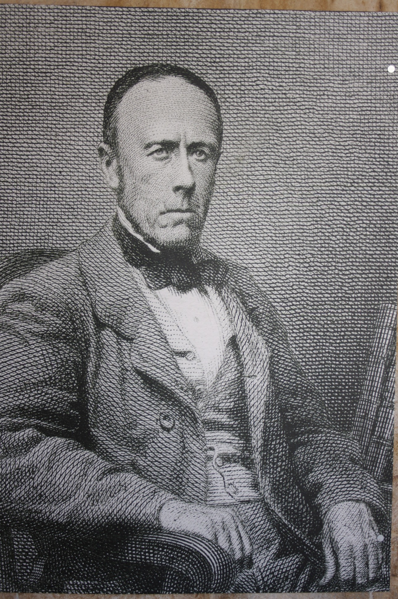 Alexandre Herculano à Lisbonne